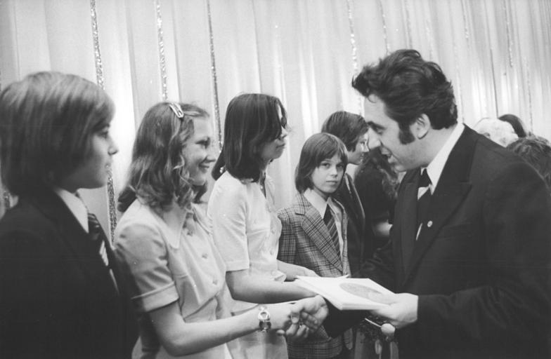 Berlin, Jugendweihe, Egon Krenz ADN-ZB Franke 13-4-1975-be Berlin: Jugendweihefeier im "Kosmos"-Über 130 Schüler aus den achten Klassen der Wilhelm-Koenen- und der Herbert-Baum-Oberschule des Berliner Stadtbezirks Friedrichshain erhielten am 13.4. im Filmtheater "Kosmos" ihre Jugendweihe. Der 1. Sekretär des Zentralrats der FDJ, Egon Krenz (r), wünschte den Mädchen und Jungen alles Gute für ihren weiteren Lebensweg. (Siehe dazu ADN-Meldung bln200 vom 13.4., 12.47 Uhr)